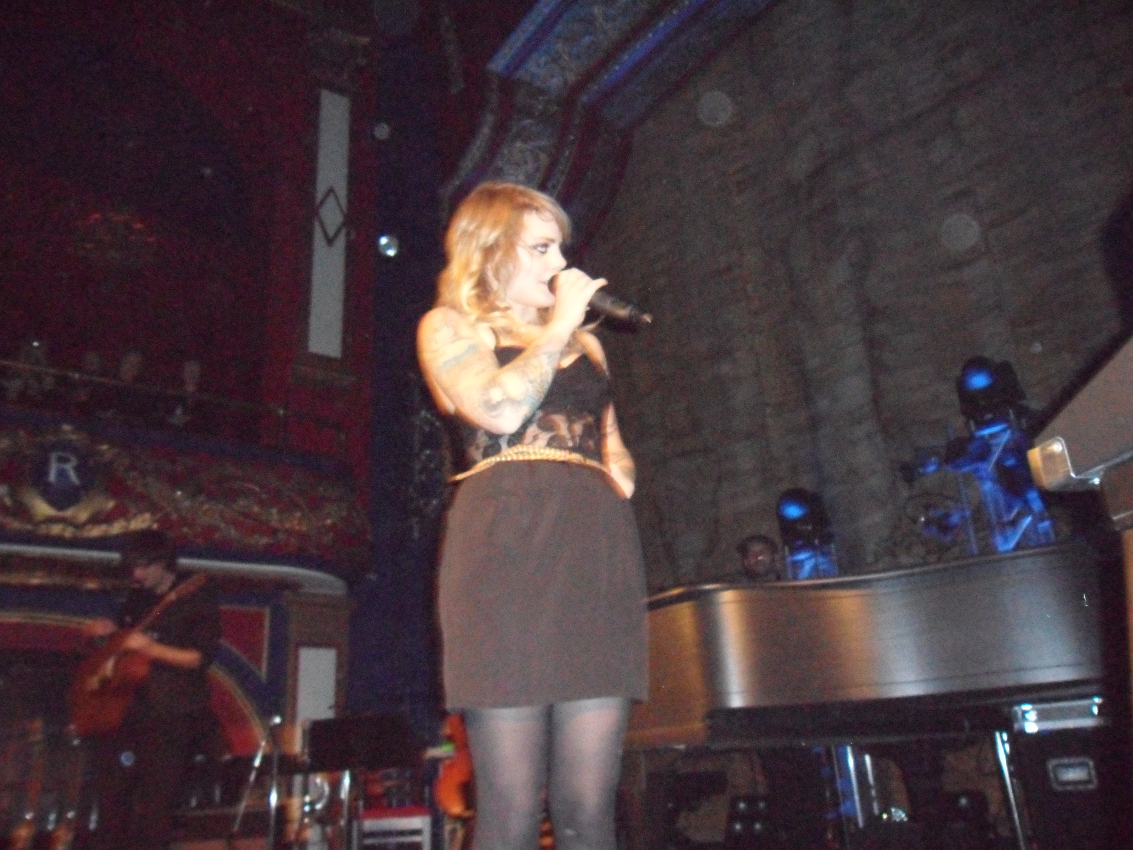 Coeur de Pirate au Théâtre Rialto, Montréal, novembre 2011.